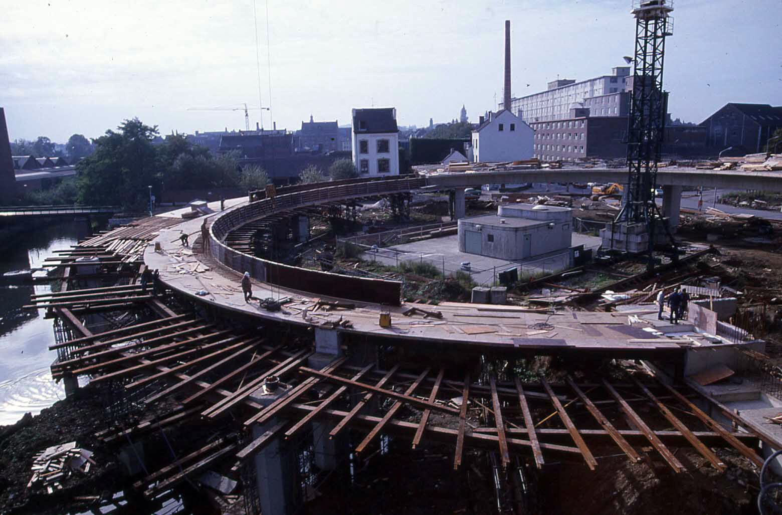 Bouw van de oprit ("krul") van de Noorderbrug bij de Bosscherweg / Fransensingel in Maastricht in 1983. Links de brug over de Zuid-Willemsvaart aan de Fransensingel. Rechts de fabrieksgebouwen van Sphinx. Fotocollectie RHCL Maastricht, GAM 38727.